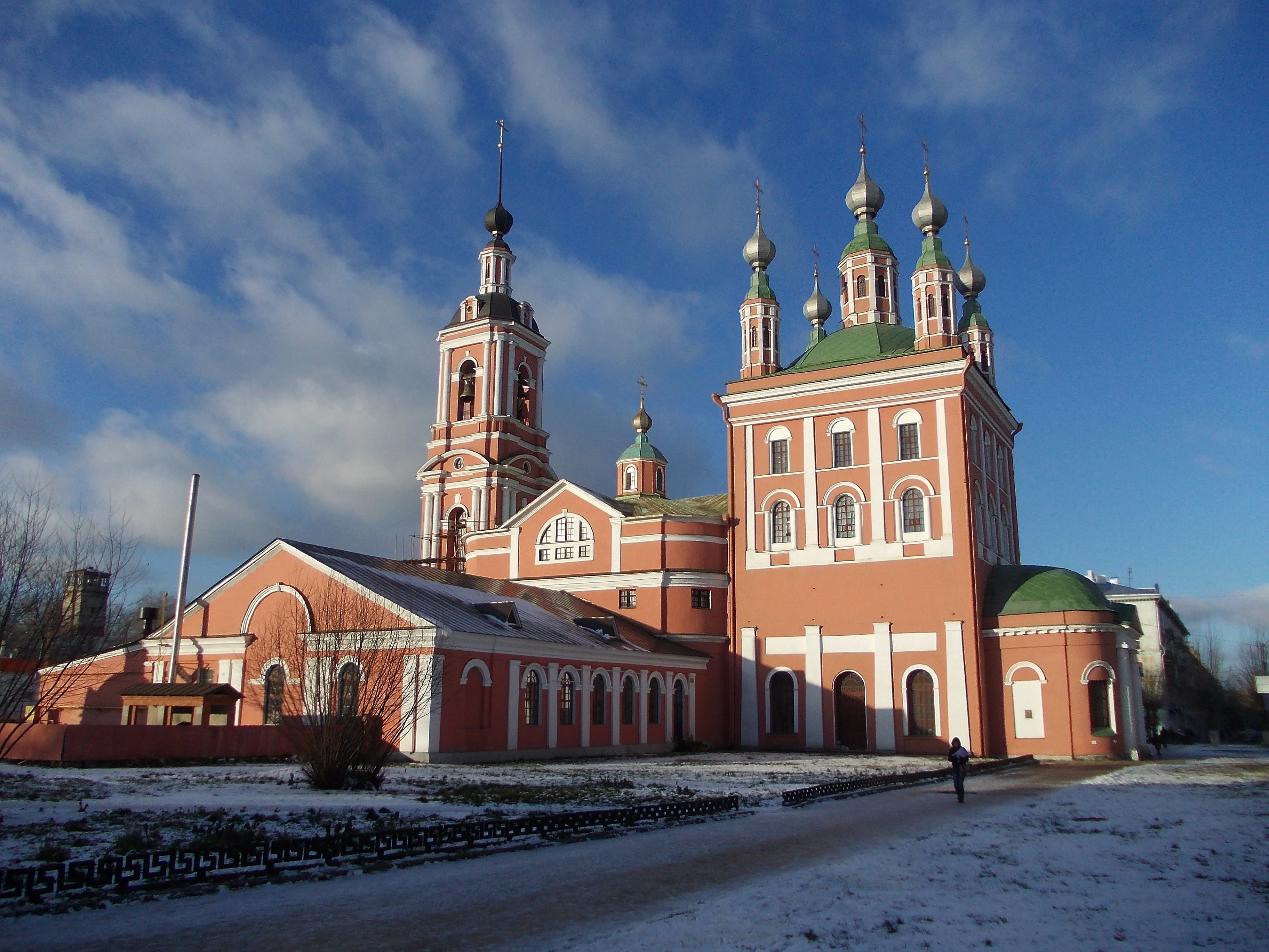 Рязань,ул.Скоморошинская,д.6.Николо-Ямской храм.1788.